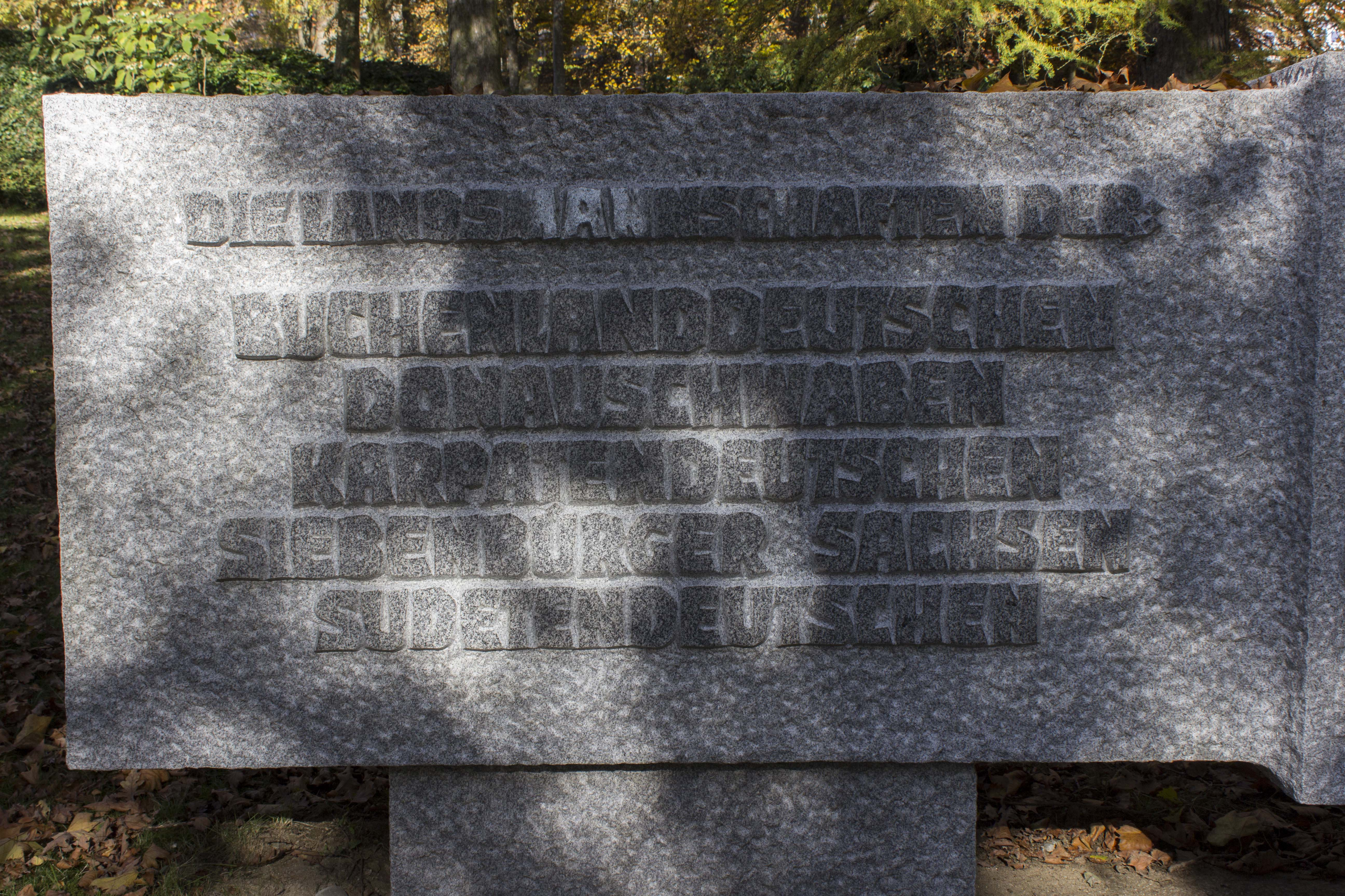 Stiftende Landsmannschaften des Denkmals für die Heimatvertriebenen auf dem Pöstlingsberg in Linz